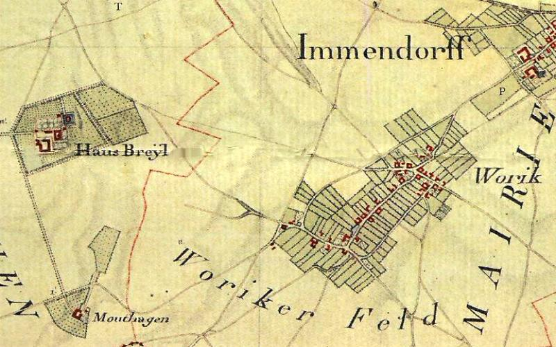 Kartenaufnahme der Rheinlande 1803-1820